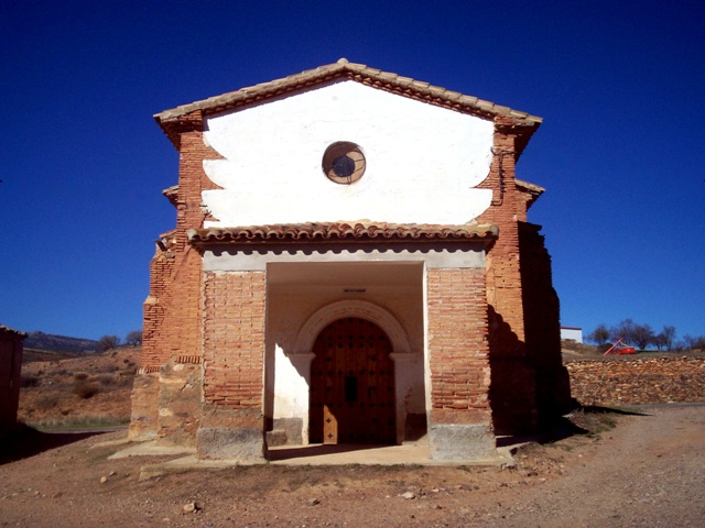 Ermita de Santa Bárbara de Villar de los Navarros